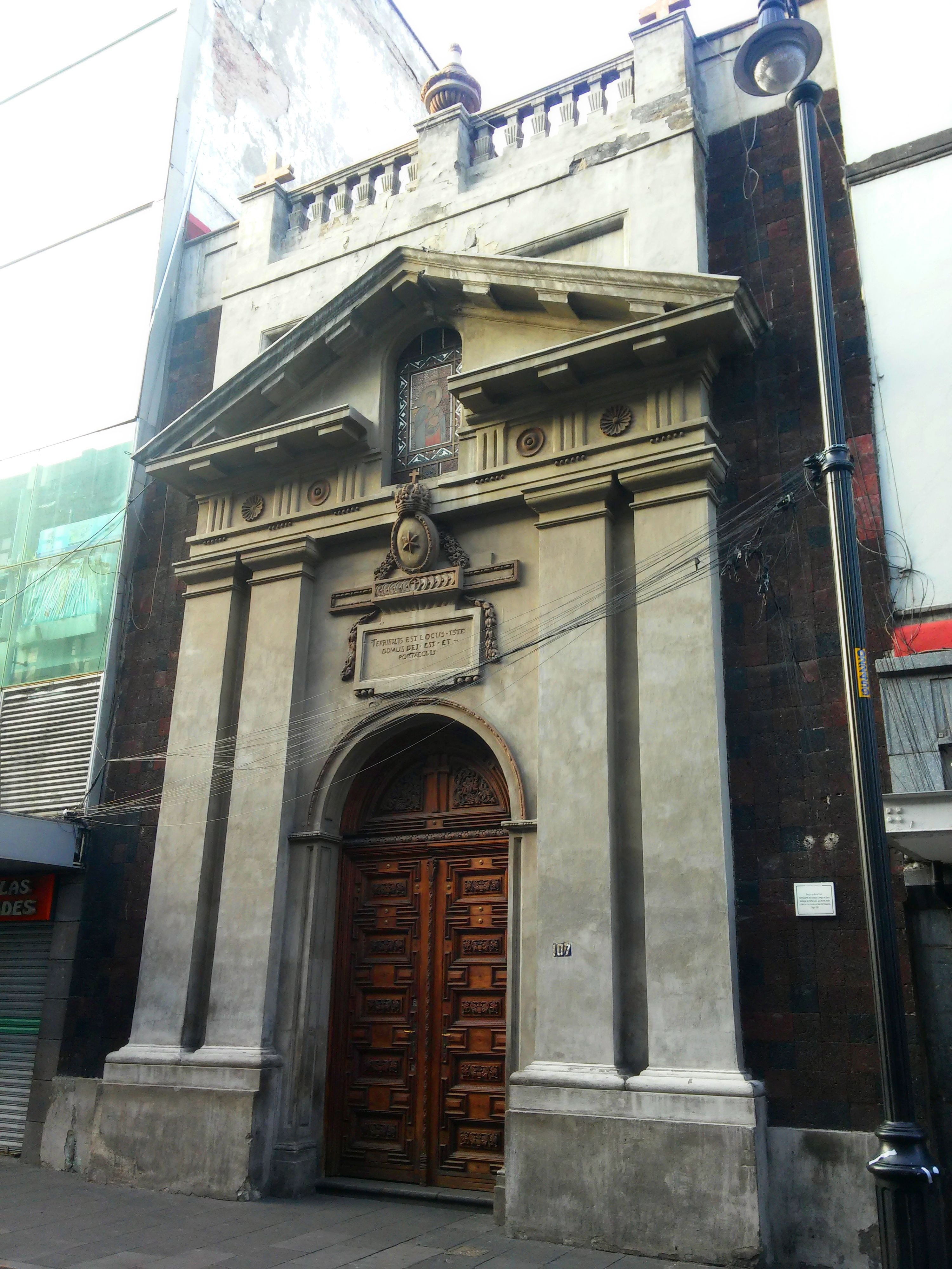 Templo del colegio dominico de Porta Coeli en el centro histórico de la Ciudad de México